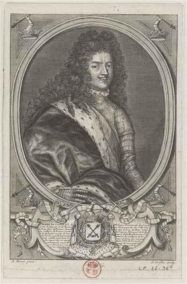 Portrait de Pierre de Gondi, duc de Retz